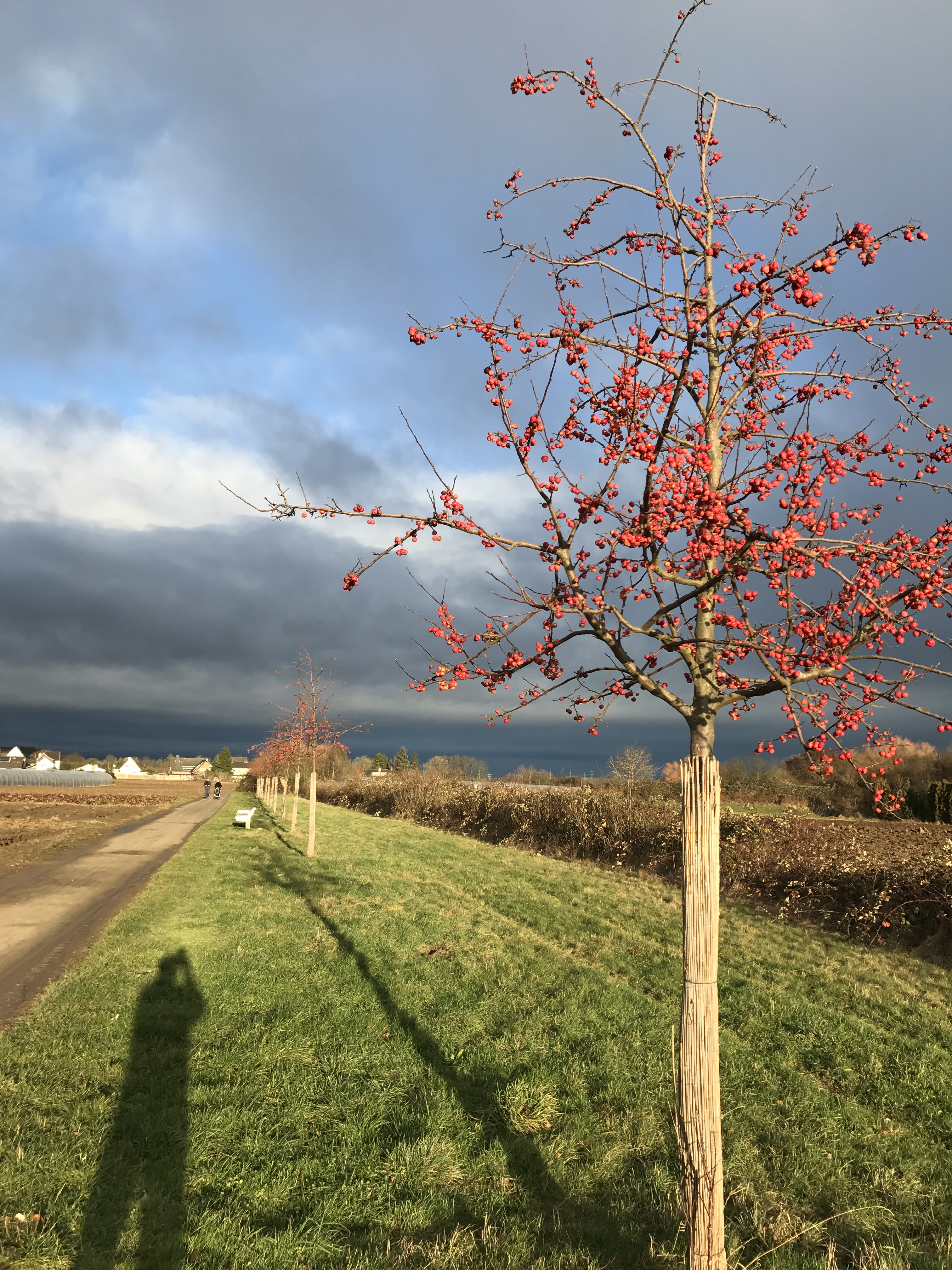 Baumreihe Grünes „C“